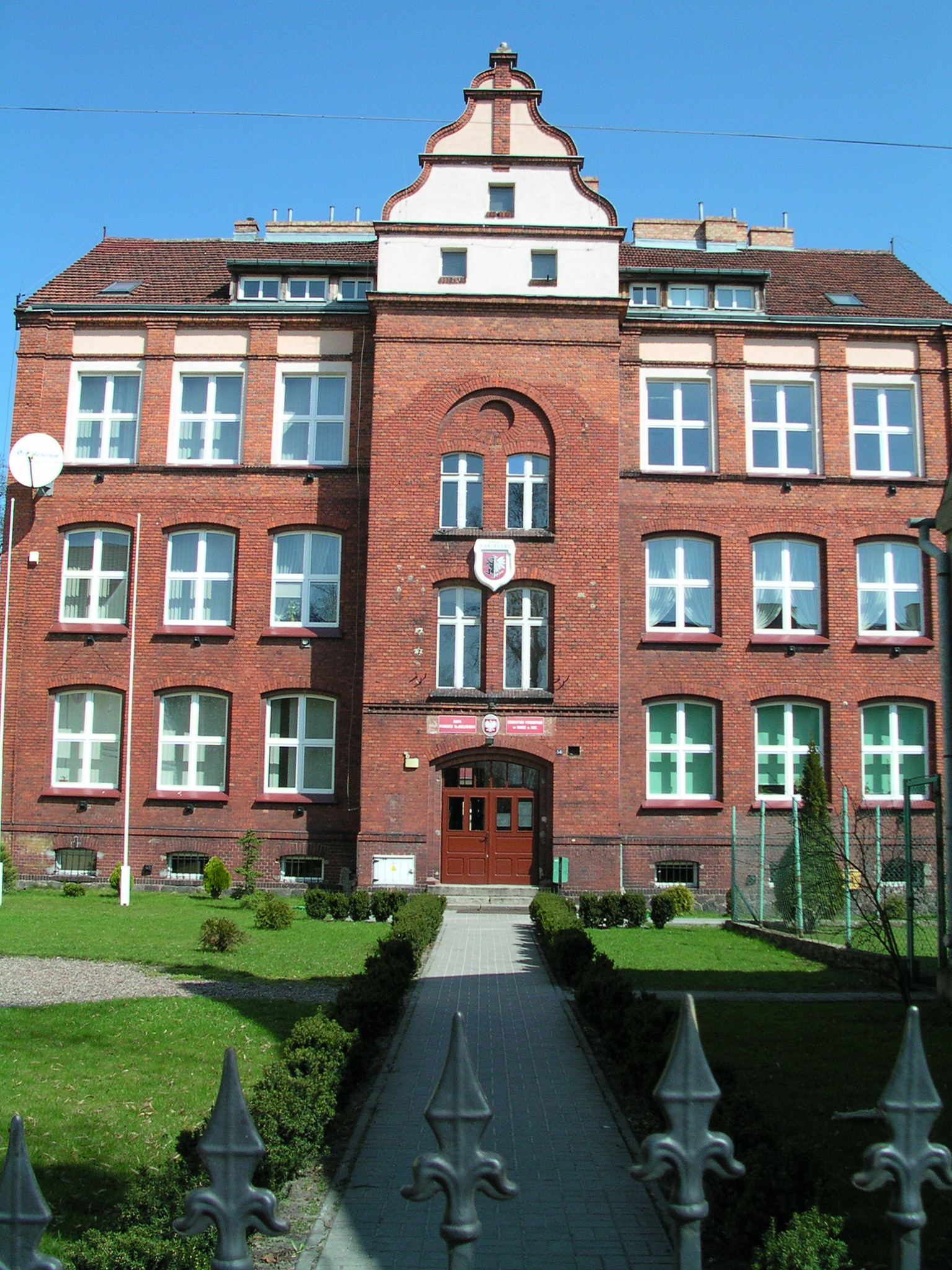 Urząd Powiatowy, dawna szkoła kpodstawowa nr. 1